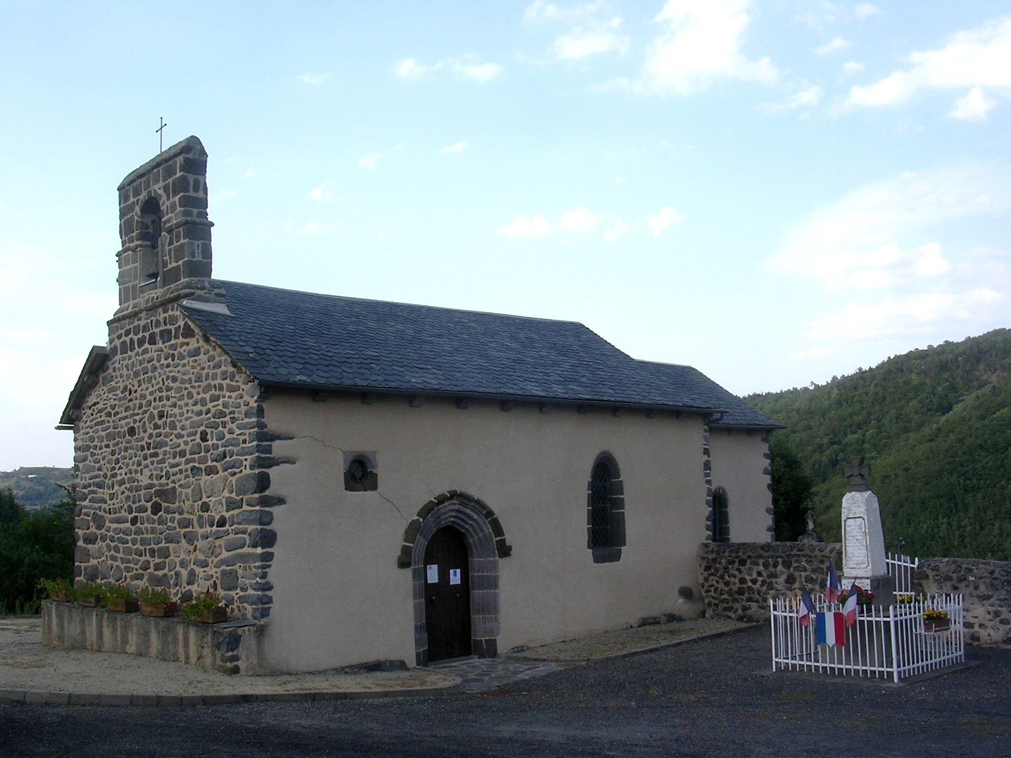 Eglise de Valjouse Cantal France